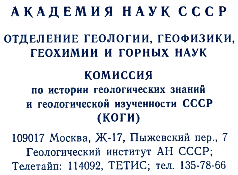 Текстовый логотип и бланк Комиссии по геологической изученности СССР (КОГИ)